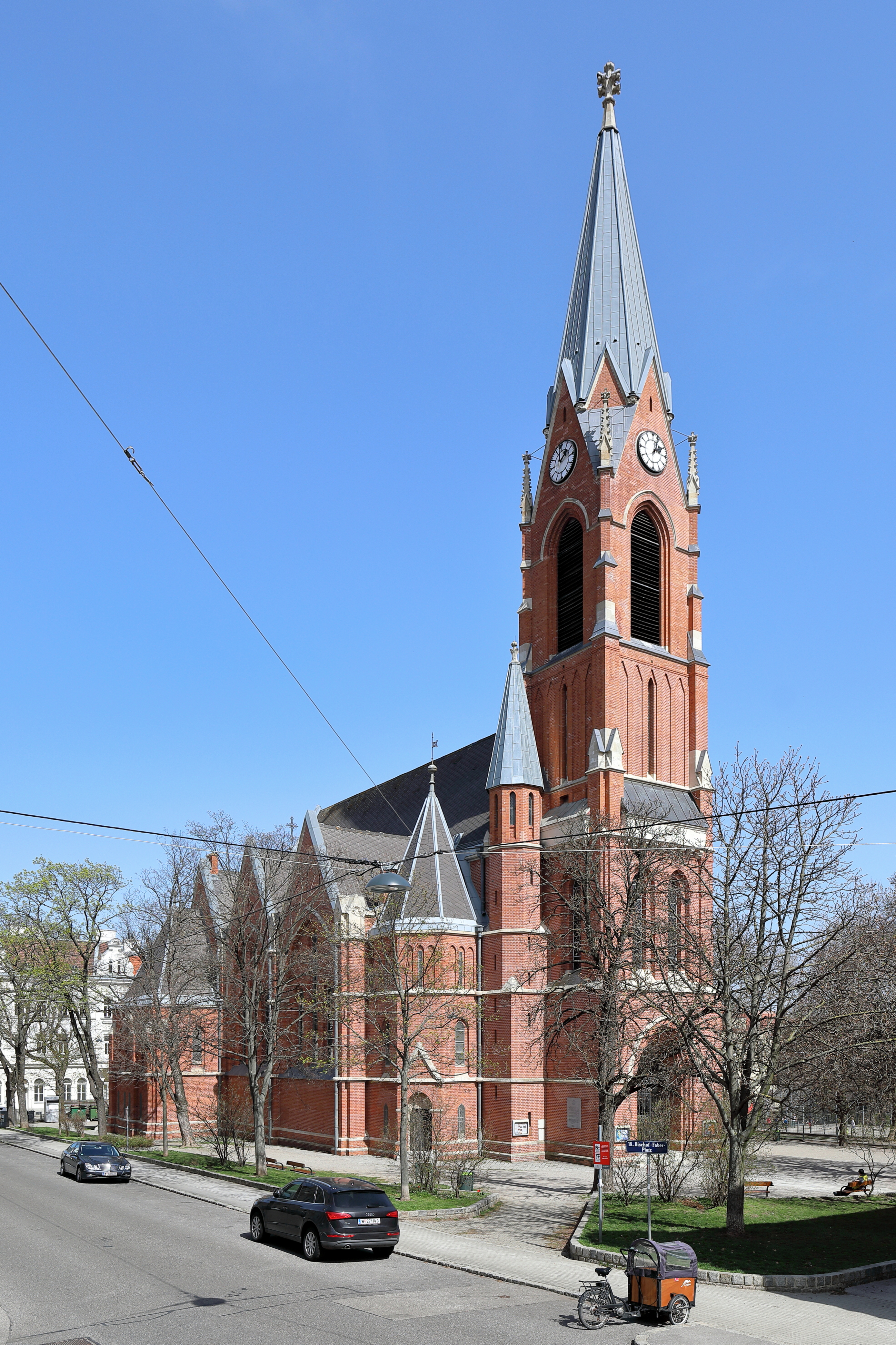 Die röm.-kath. Gersthofer Pfarrkirche St. Leopold im 18. Wiener Gemeindebezirk Währing. Der neugotische Backsteinbau wurde nach Plänen des Architekten Richard Jordan errichtet und vom Baumeister Josef Schmalzhofer ausgeführt. Die Grundsteinlegung zu der dreischiffigen Hallenkirche und erster großen Kirche in Gersthof fand am 12. September 1887 statt und die Einweihung am 15. November 1891.